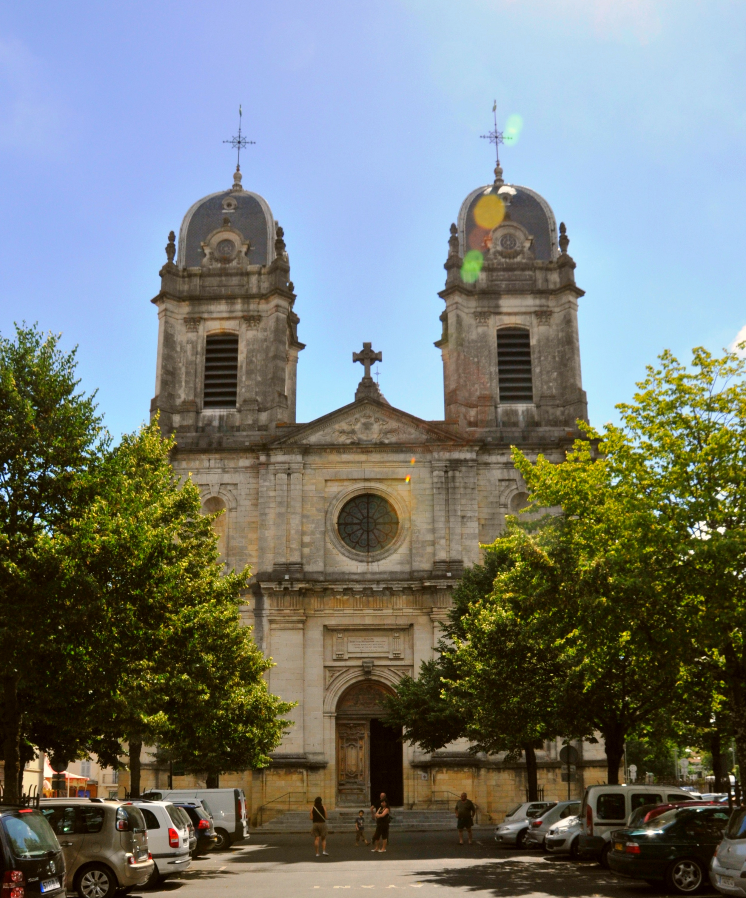 Dax